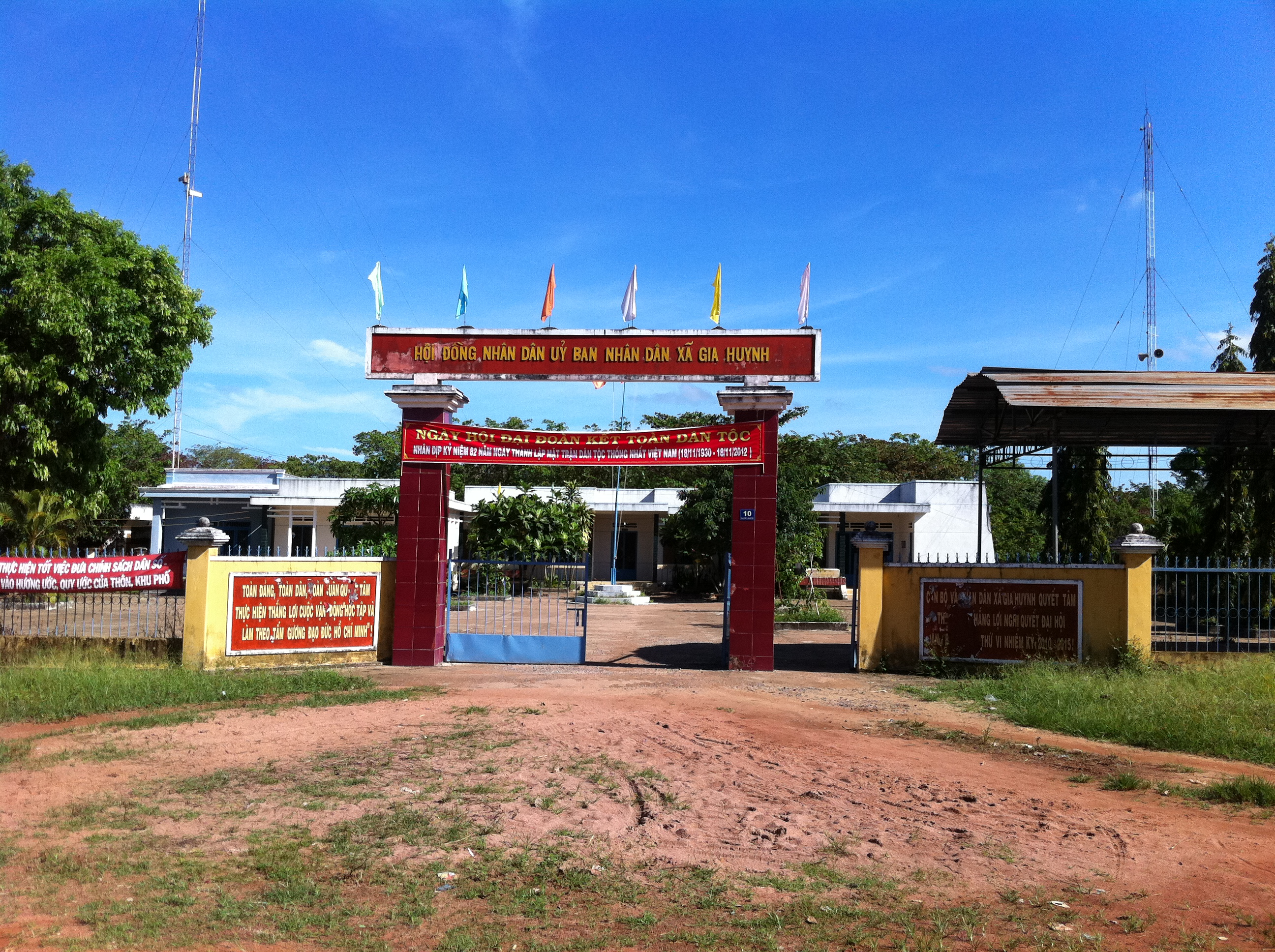 UBND xã Gia Huynh